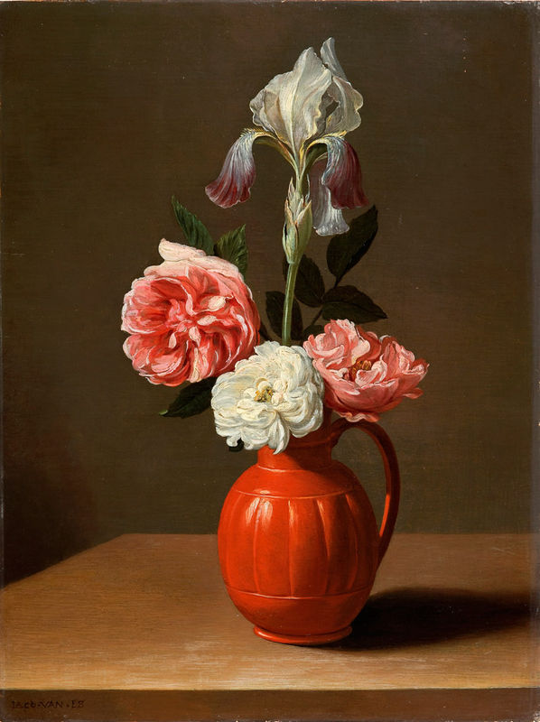 Un Iris et trois roses dans une cruche, )label QS:Lfr,"Un Iris et trois roses dans une cruche, )"